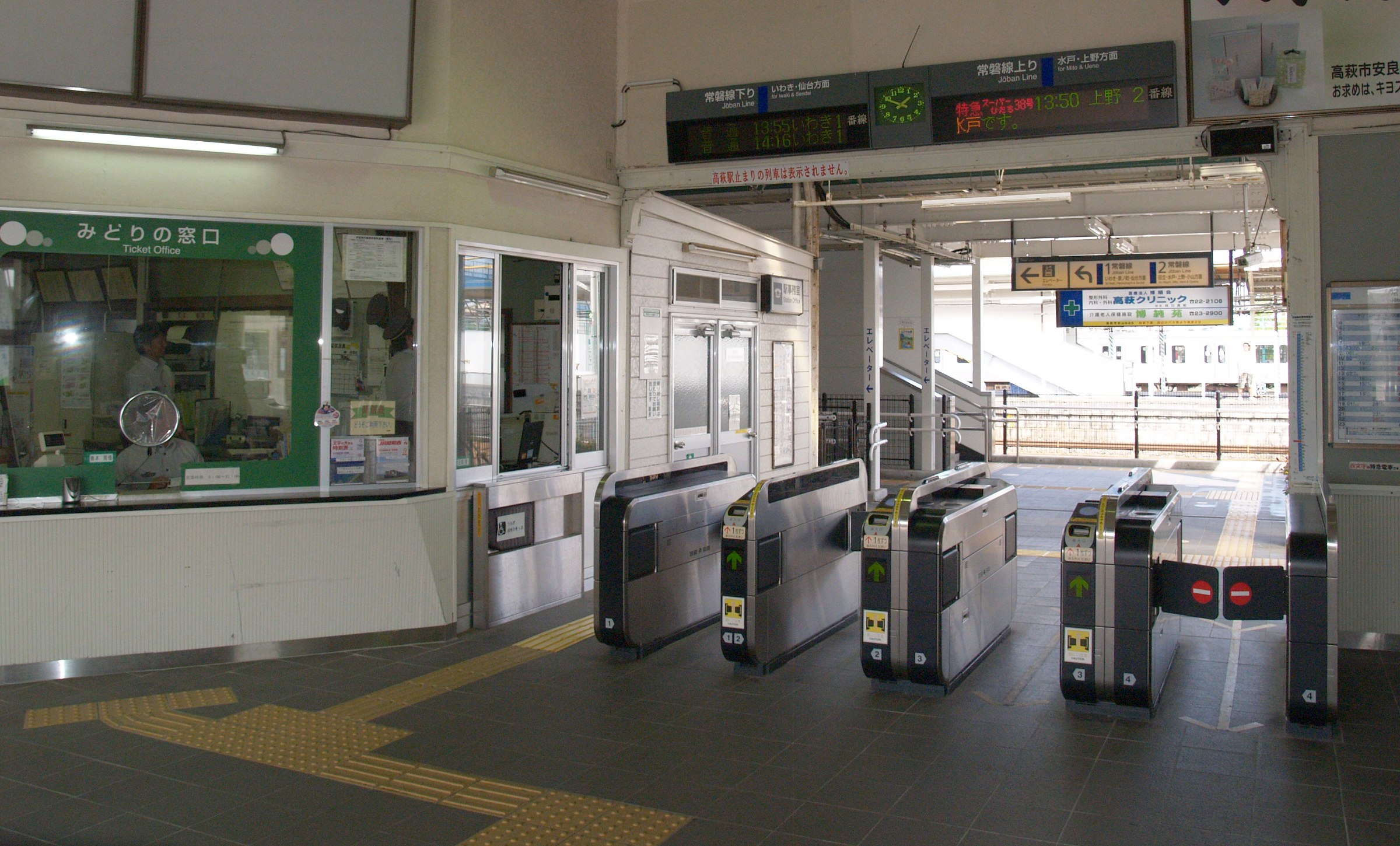 高萩駅改札口